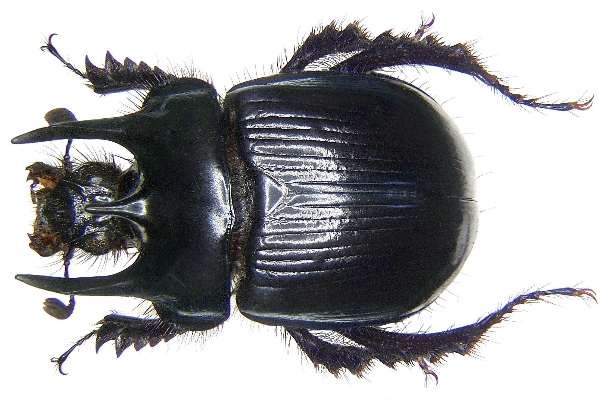 Familie: Geotrupidae Groesse: 15-24 mm Verbreitung: Westeuropa, Mitteleuropa Ökologie: in sandigen Heidegebieten und in lichten Kiefernwäldern Fundort: Germania, Hessen, Frankfurt, Mönchwald, 1970 det. U.Schmidt; Photo: U.Schmidt, 2007